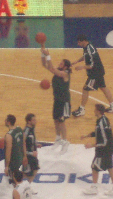 Fragiskos Alvertis. Panathinaikos - Efes Pilsen